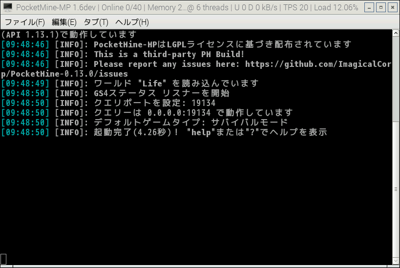 PocketMine-MP動作画面